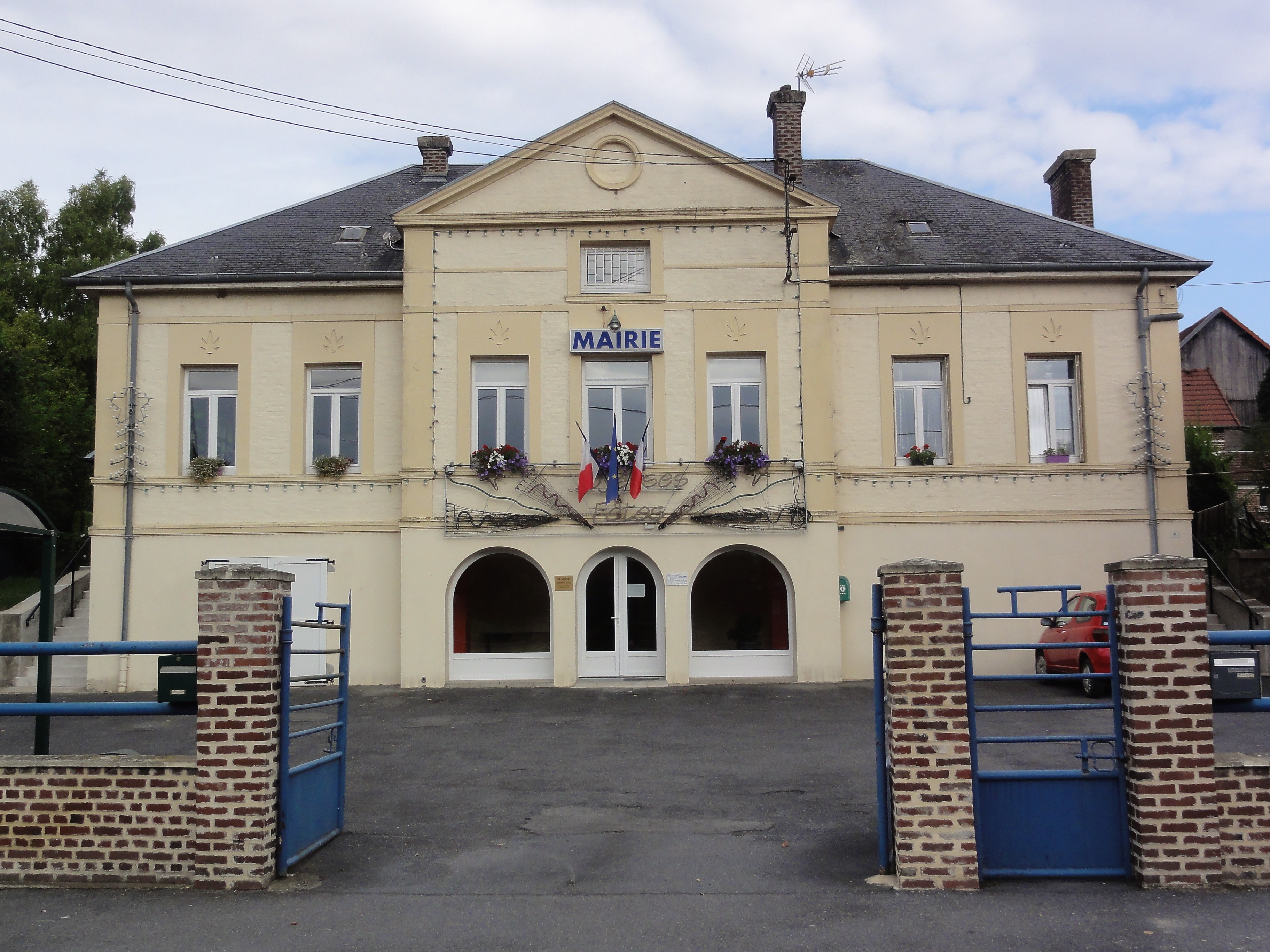 Fontaines-lès-Clercs (Aisne) mairie